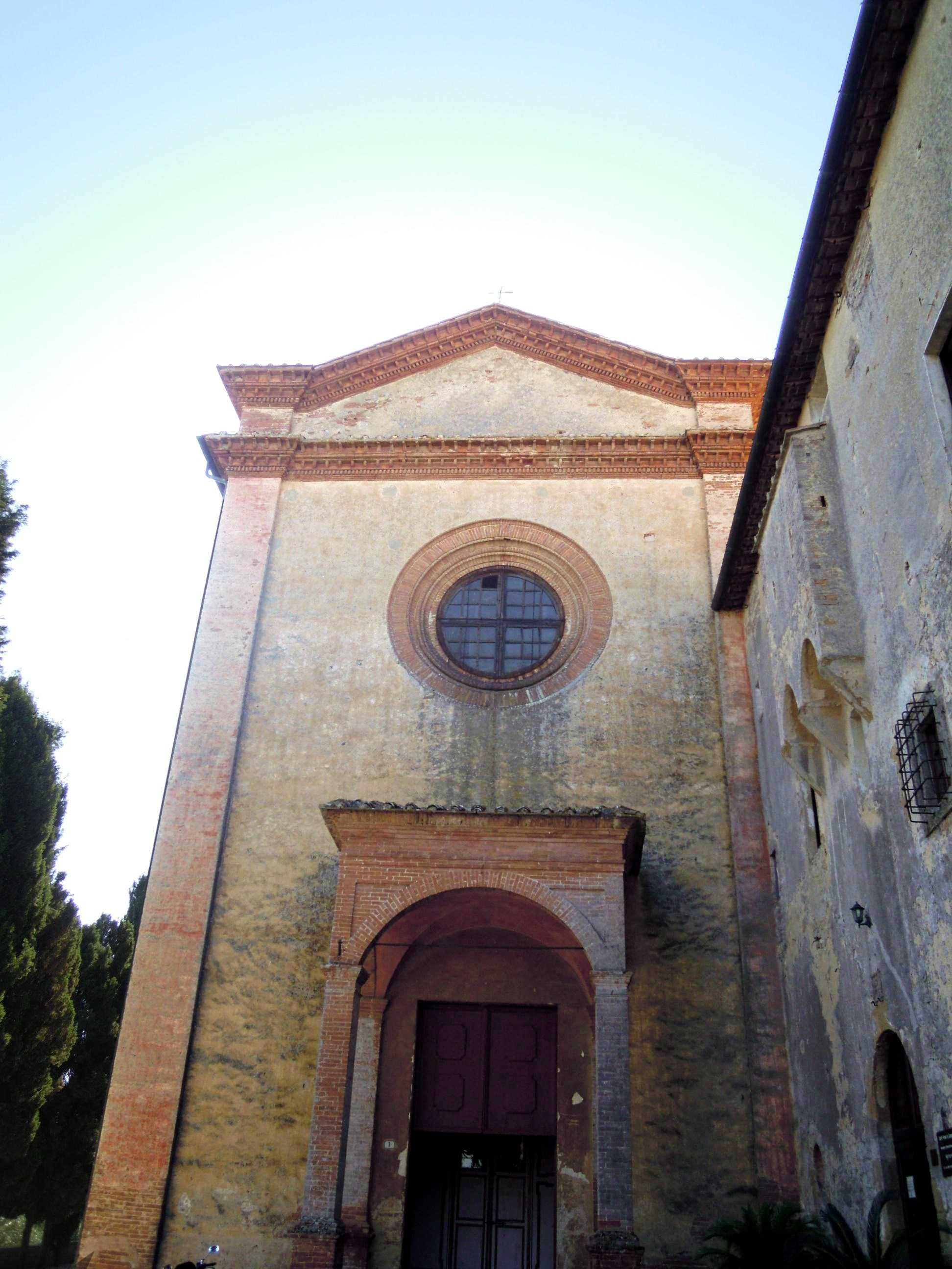 Monastero di Sant'Anna in Camprena, situato all'interno del comune di Pienza, in provincia di Siena, Toscana.